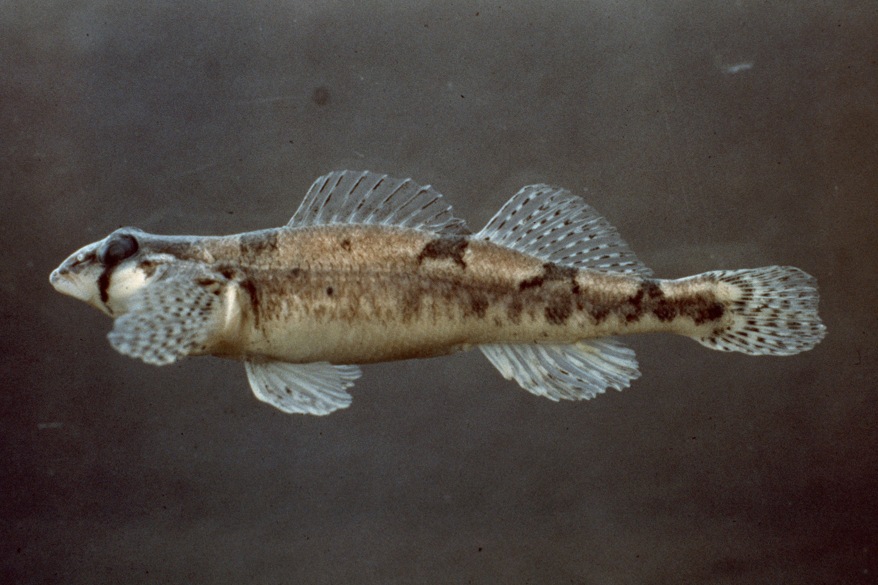 Snail darter (Percina tanasi)